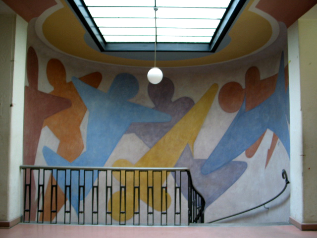 Van-de-Velde-Bau ("Werkstattgebäude des Staatlichen Bauhaus Weimar" - Figurenfries des Bauhausmeisters Oskar Schlemmer an der Wand der Wendeltreppe anlässlich der Bauhausausstellung 1923 (Rekonstruktion von 1979)